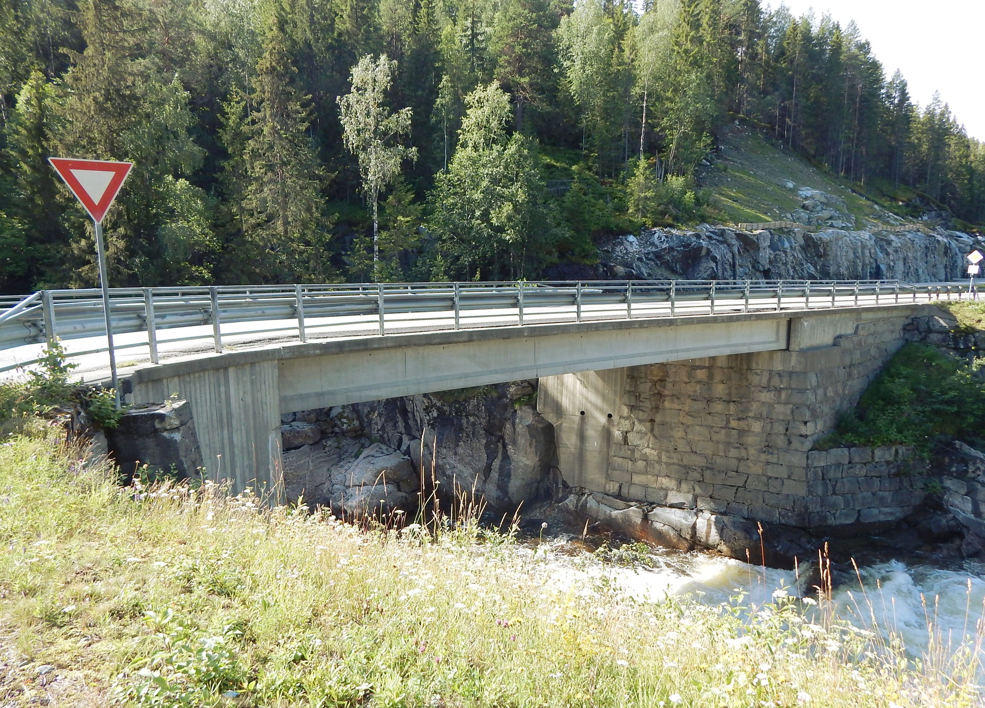 Høljerast bru